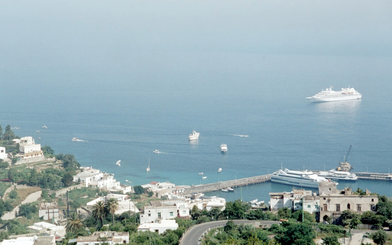 D'Bucht vu Capri.